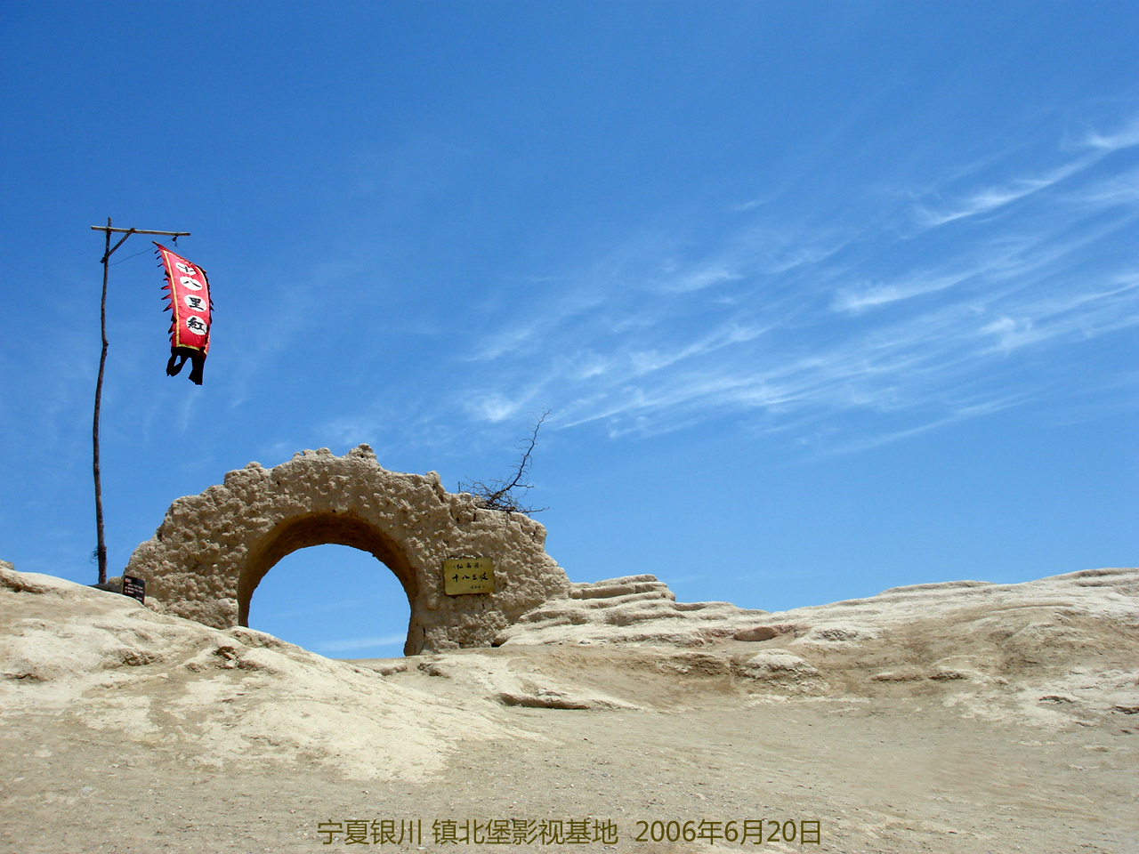 “十八里红”----宁夏银川 镇北堡影视基地 zhen bei pu